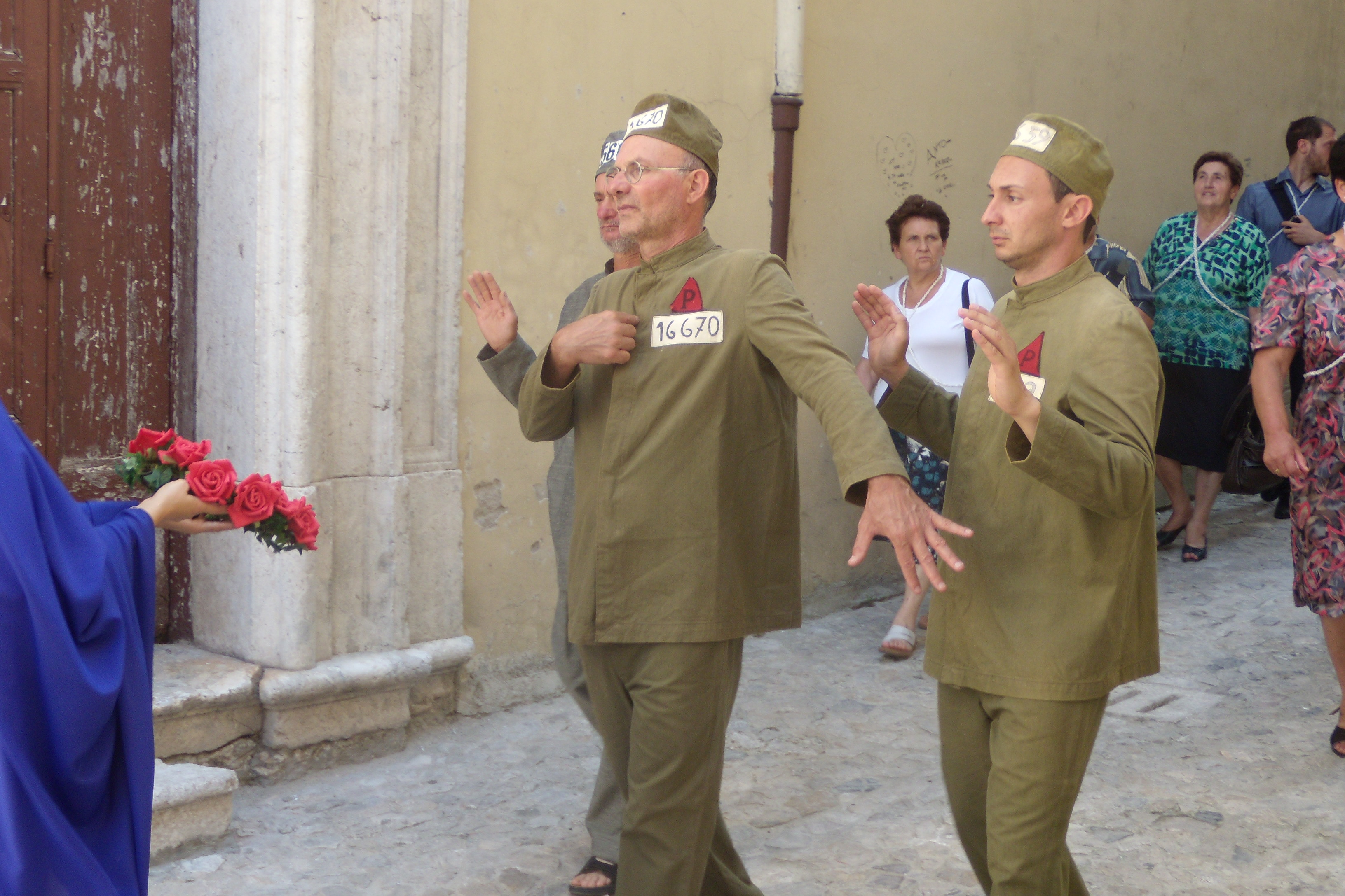 Uno dei "misteri" (rappresentazioni di scene sacre) durante l'edizione 2010 dei riti settennali di penitenza in onore dell'Assunta a Guardia Sanframondi (Italia).